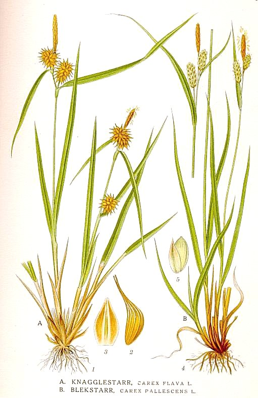 A. Carex flava L., B. Carex pallescens L. Original Description A. Knagglestarr, Carex flava L. B. Blekstarr, Carex pallescens L.